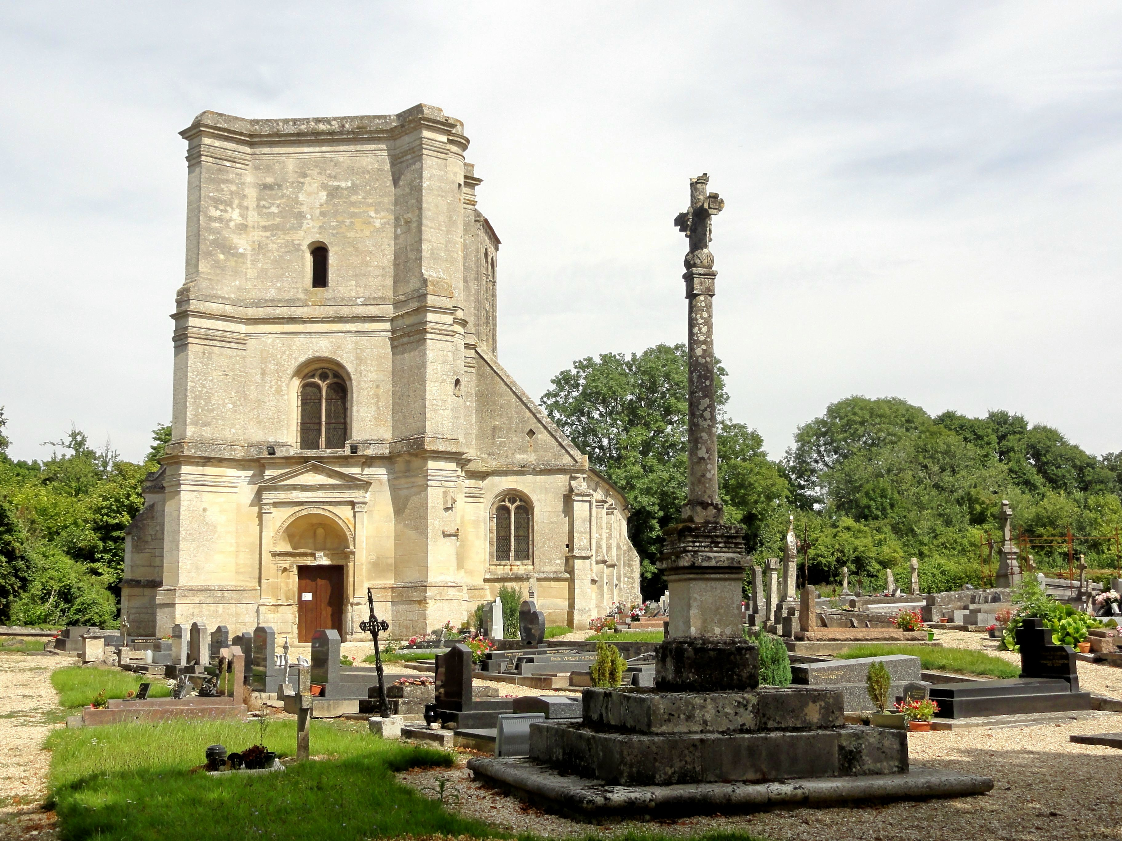 Façade occidentale.